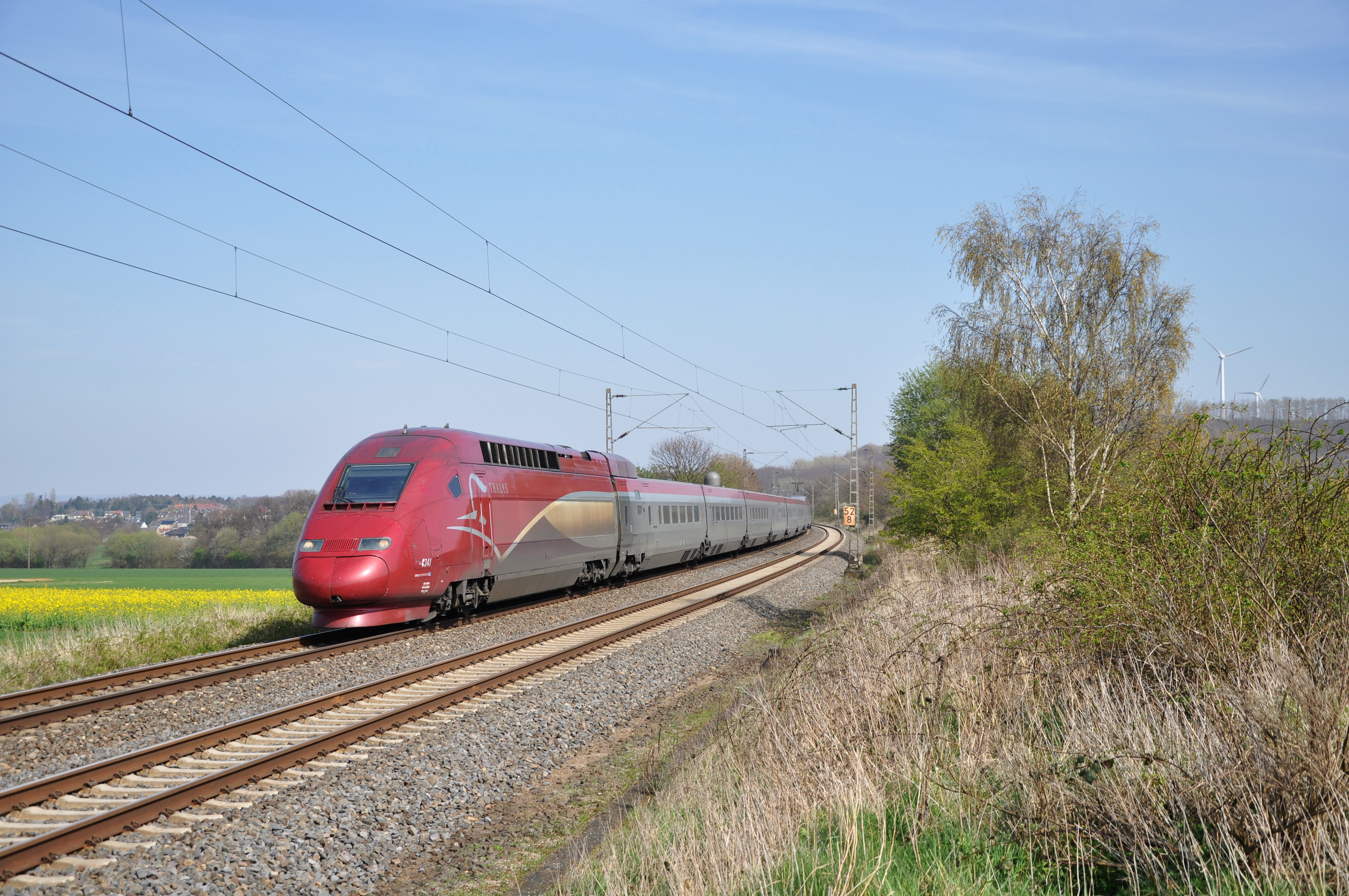 4341 / Thalys // Eschweiler / 29. März 2014